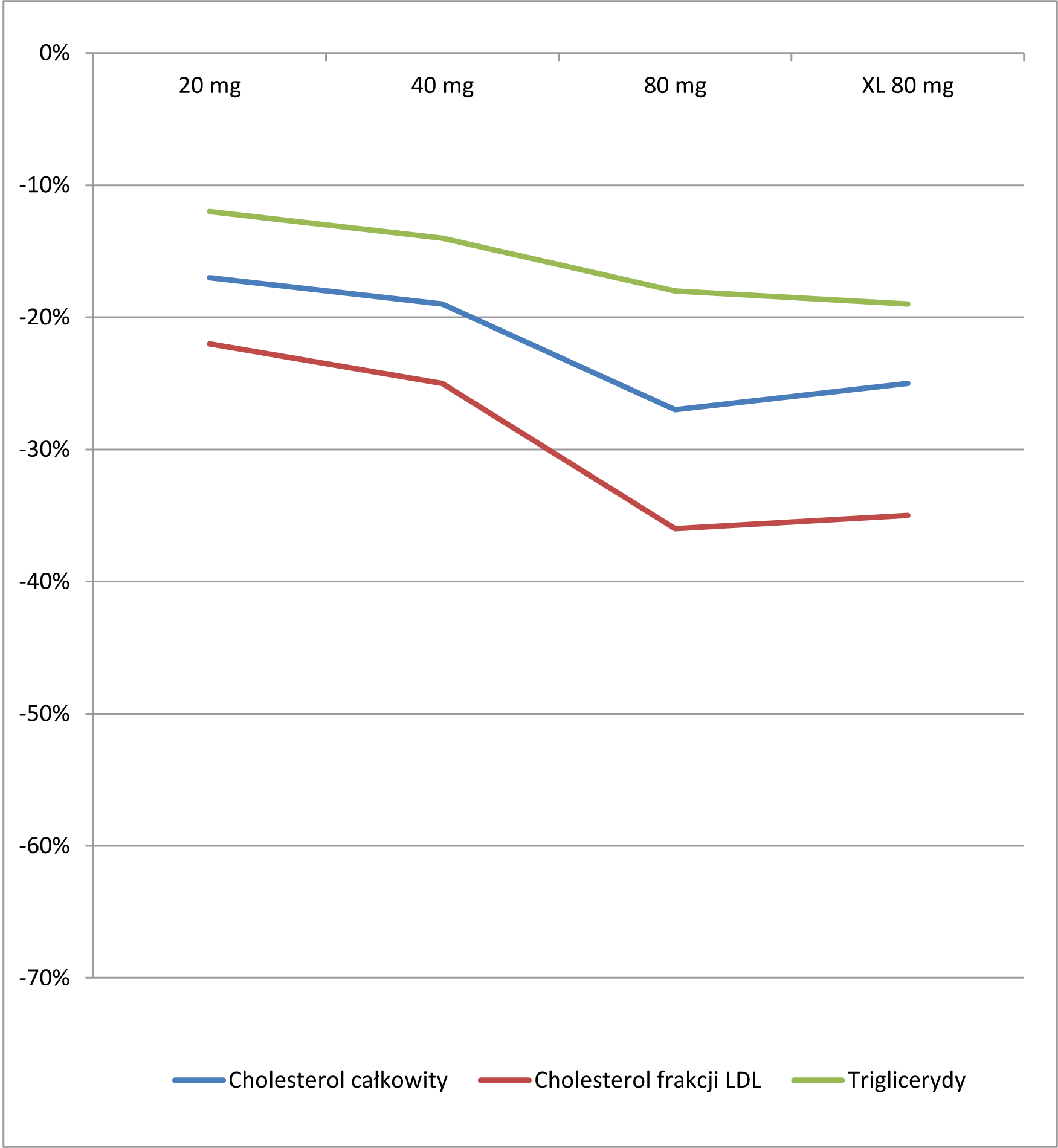 Wpływ fluwastatyny na wskaźniki lipidowe (dane do wykresu za Lescol® (fluvastatin sodium) capsules/ Lescol® XL (fluvastatin sodium) extended-release tablets for oral use)